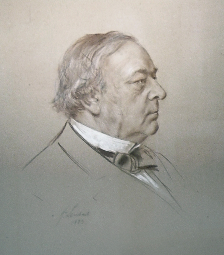 Theodor von Cramer-Klett. Kreidezeichnung von Franz von Lenbach, 1883 (Ausschnitt)